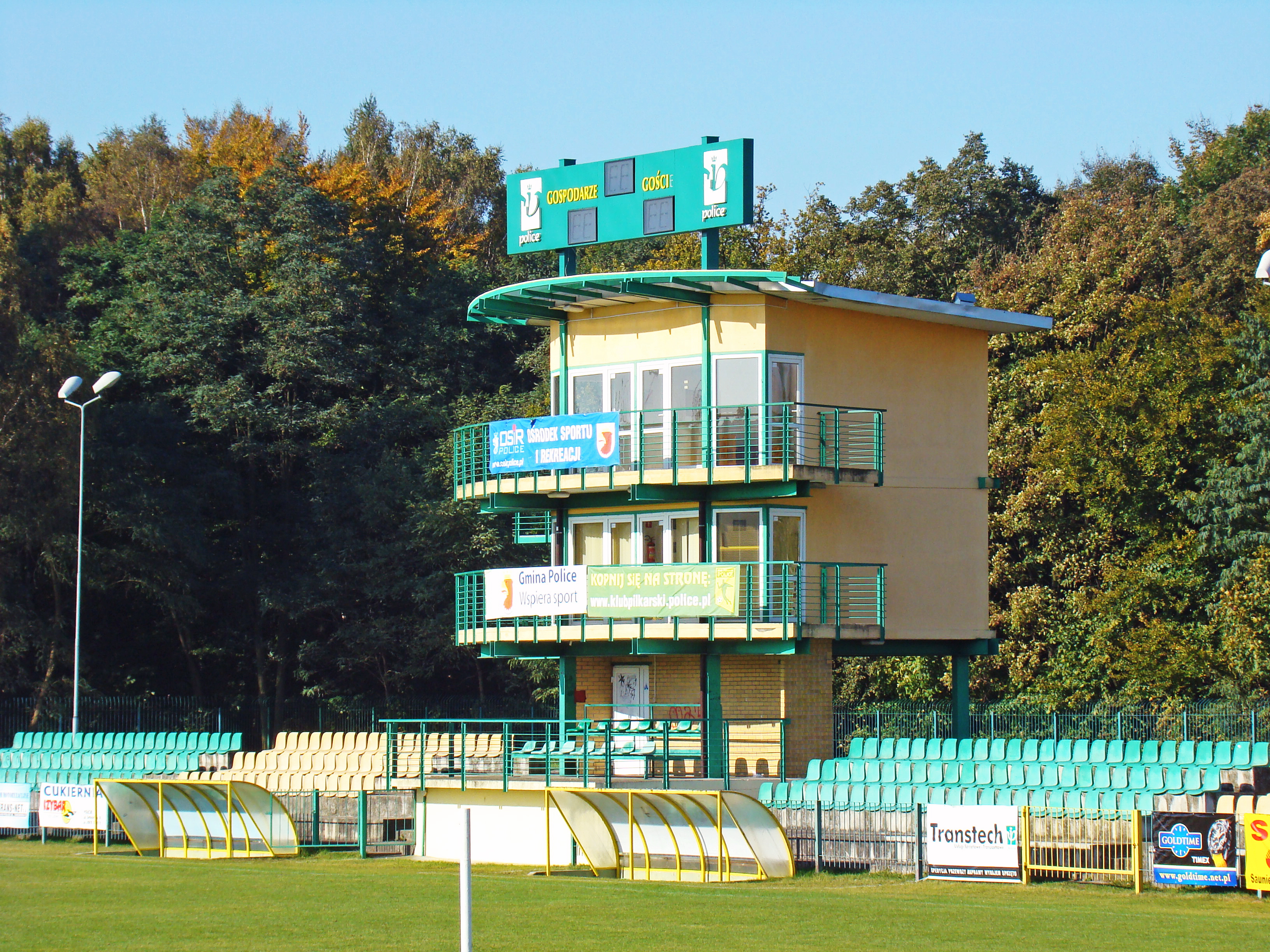 Stadion Miejski w Policach (Województwo zachodniopomorskie), Polska